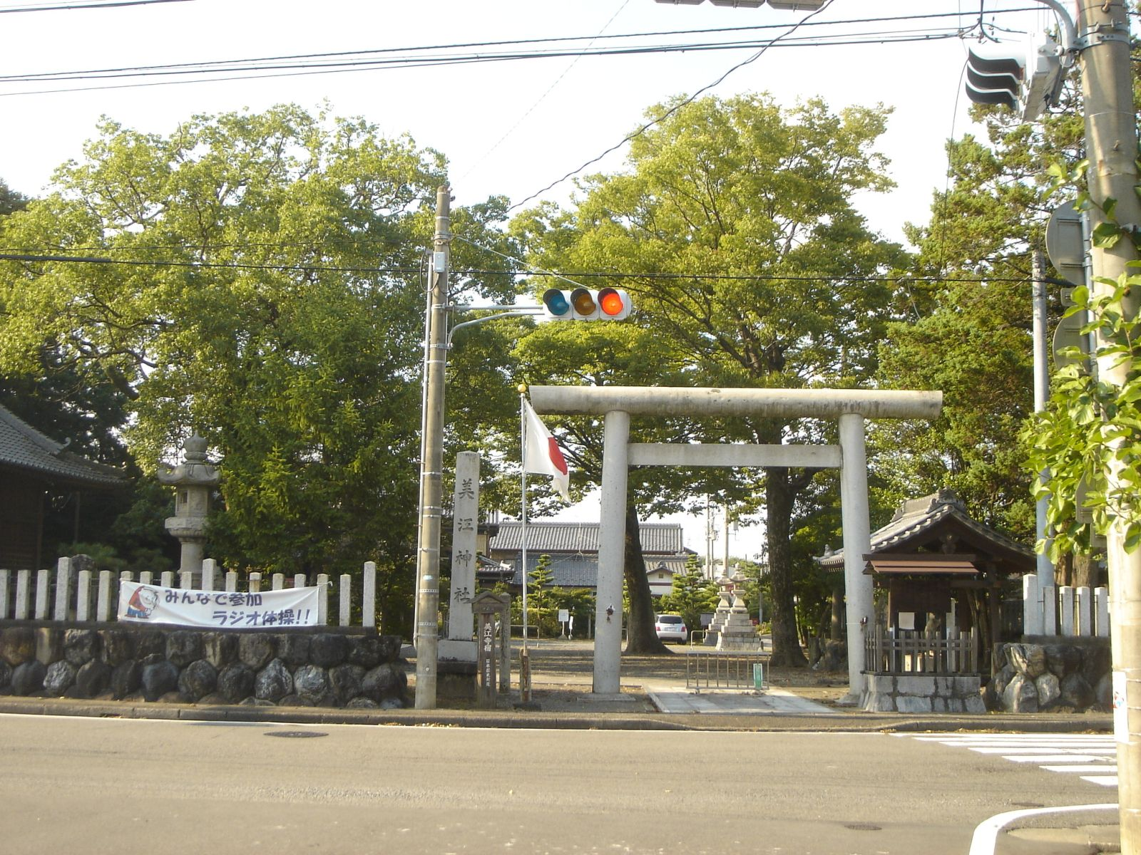 美江神社、岐阜県瑞穂市